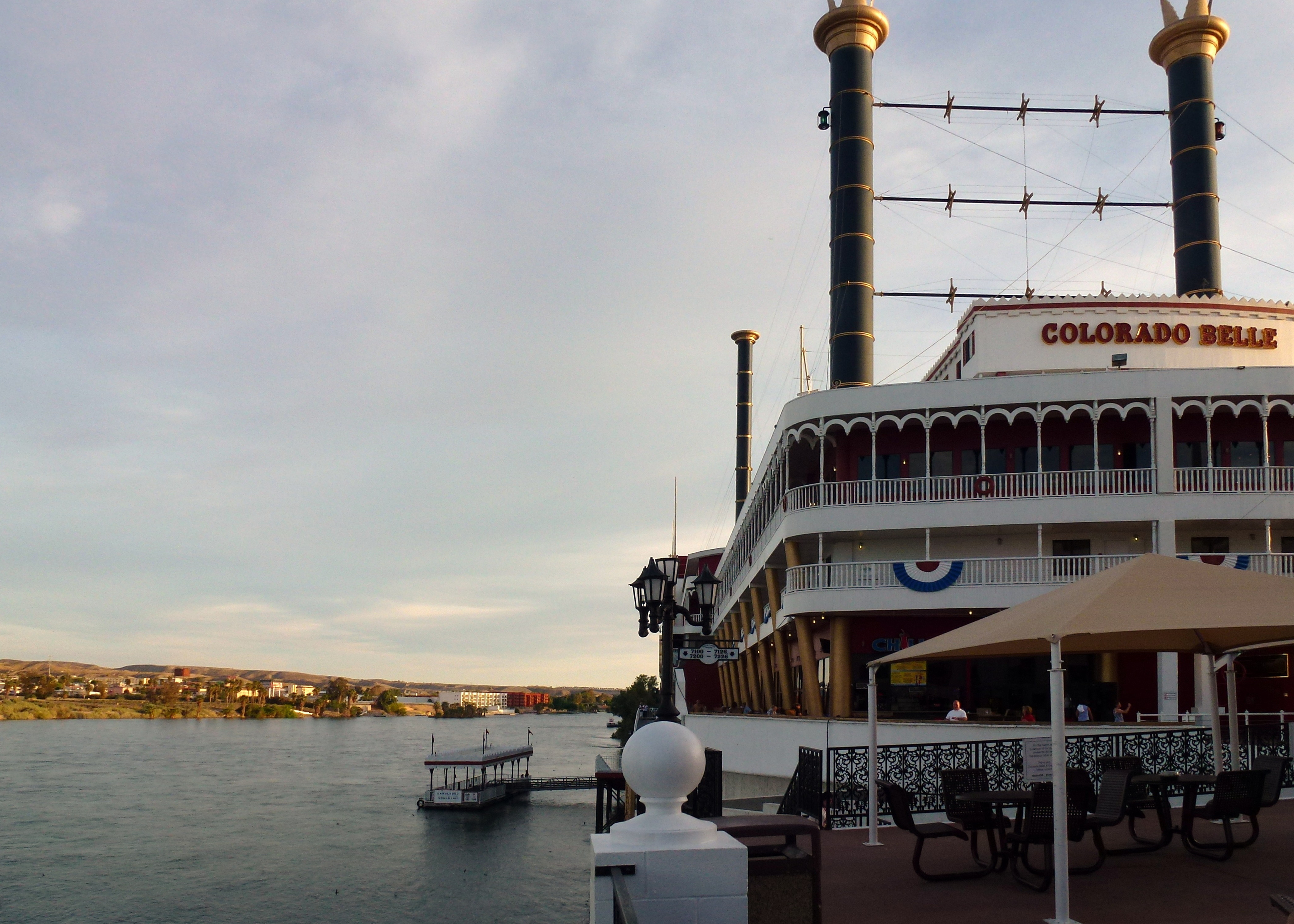 Colorado Belle Hotel & Casino (Laughlin, Nevada)